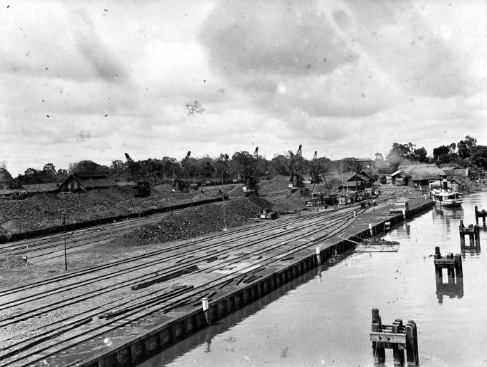 Repronegatief. Bukit Asam steenkoolmijnen, het kolenafscheep-emplacement